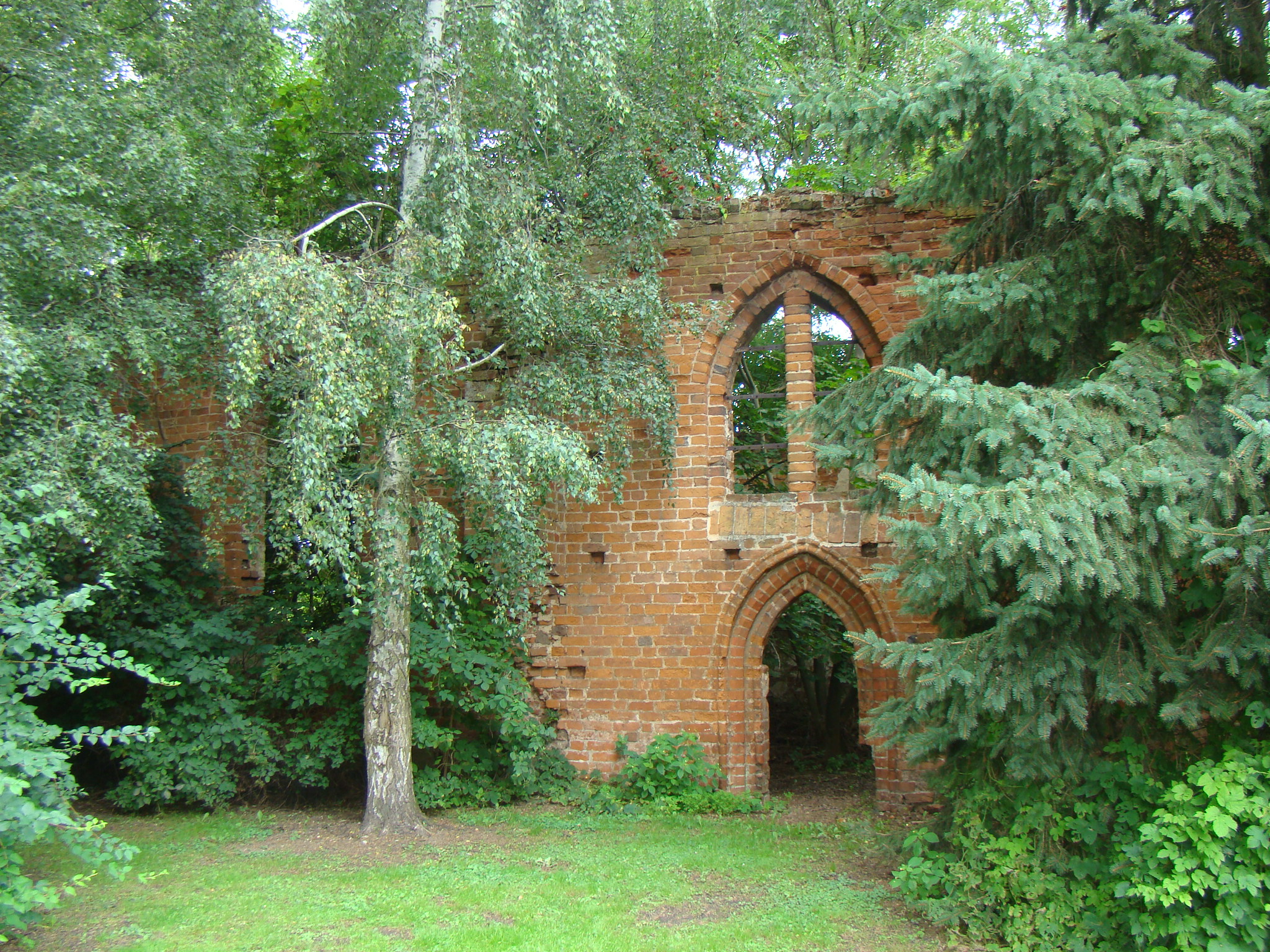 Kirchenruine Alt Panstorf, Foto: Peter Schmelzle